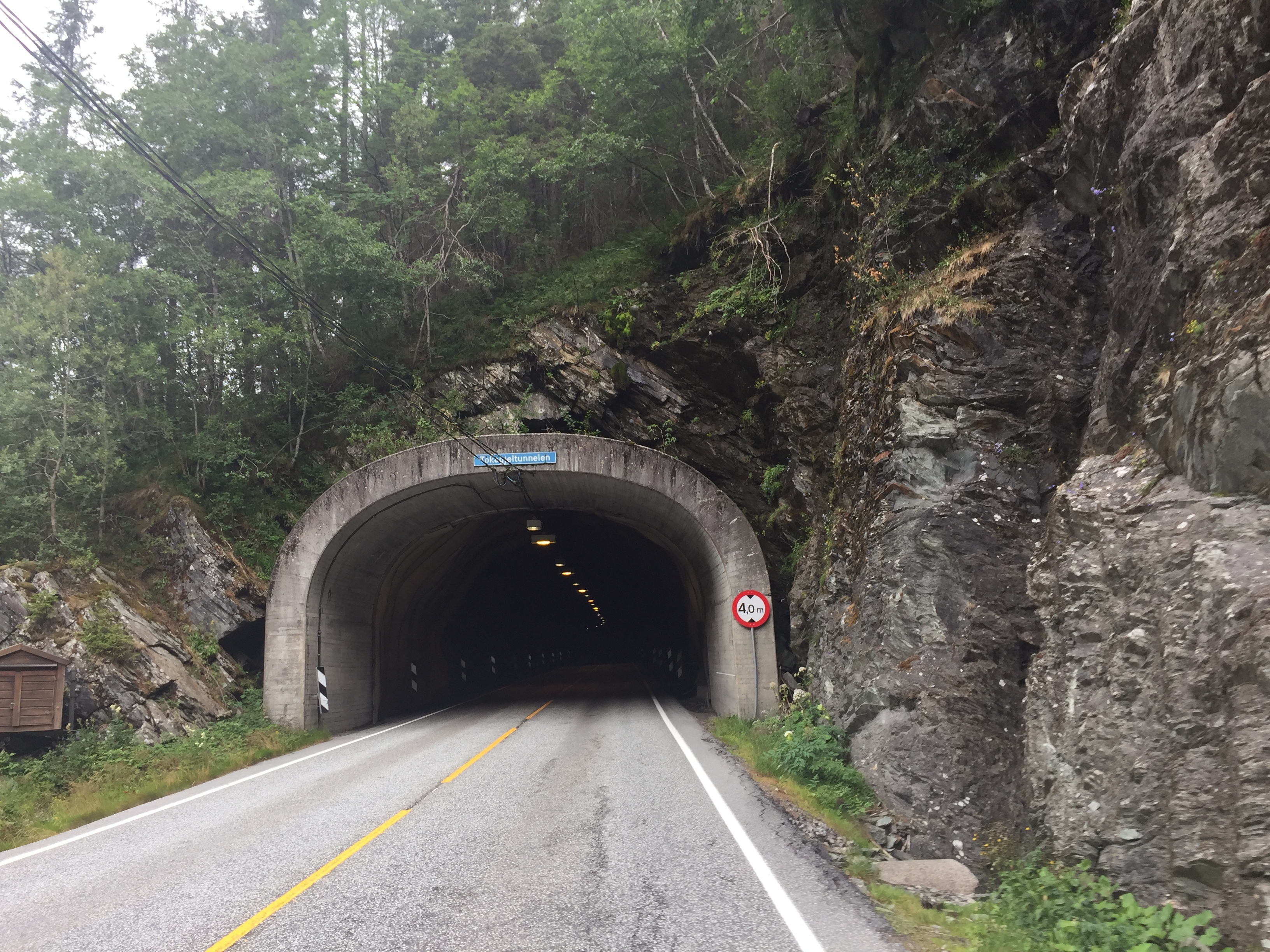 Tokagjeltunnelen